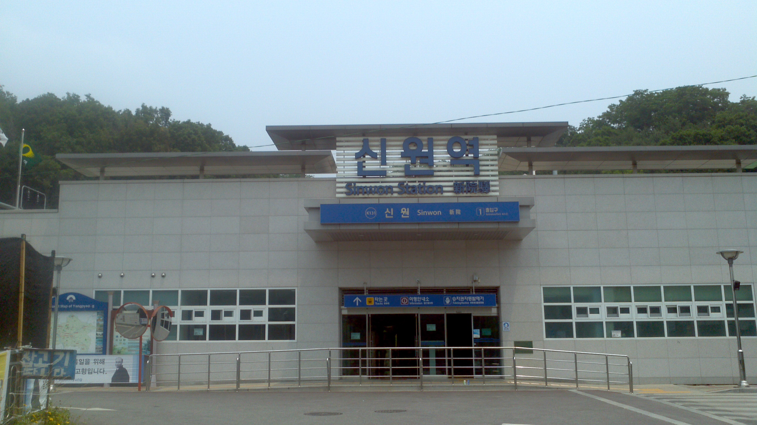 신원역 역사